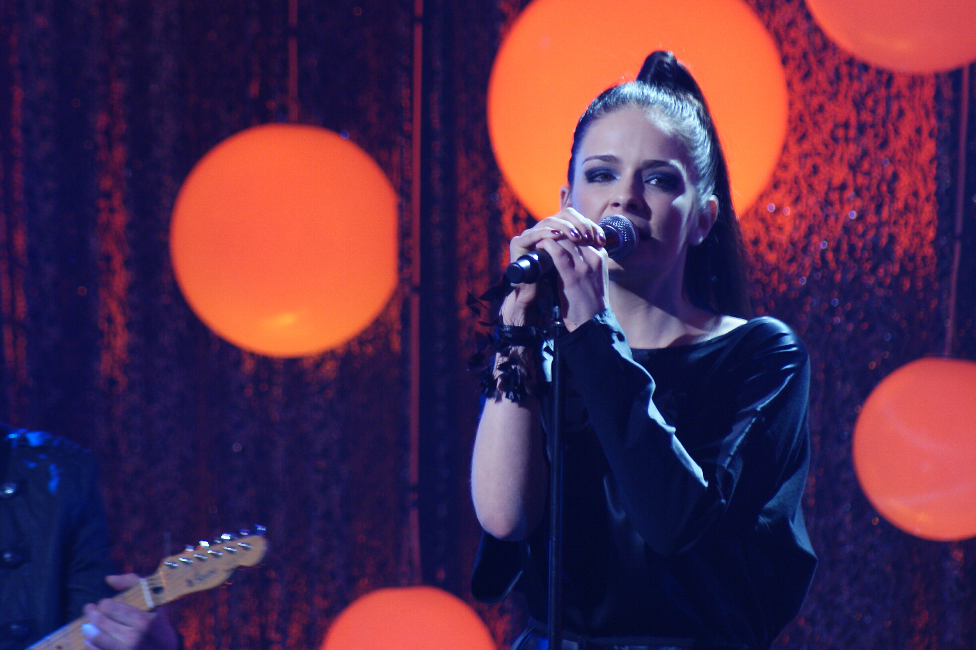 Anna Józefina Lubieniecka podczas Krajowych Eliminacji Eurowizja 2011